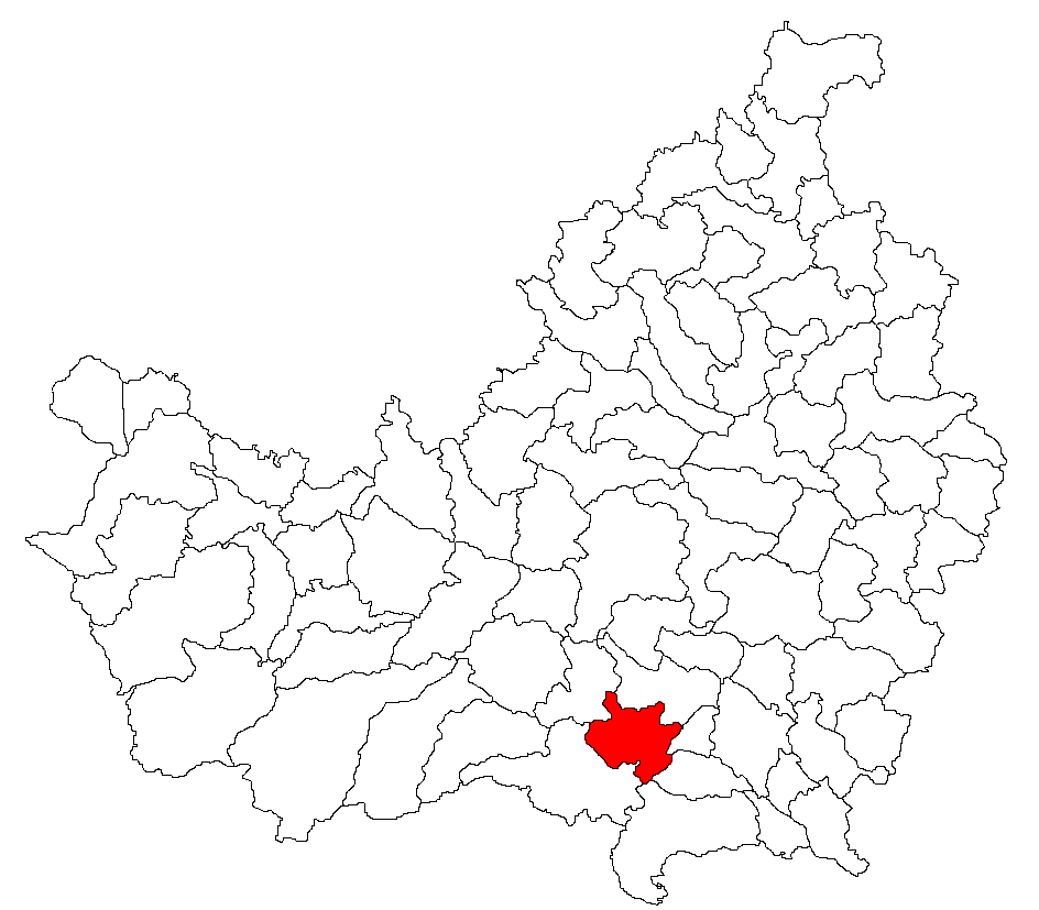 Comuna Petreștii de Jos, judeţul Cluj